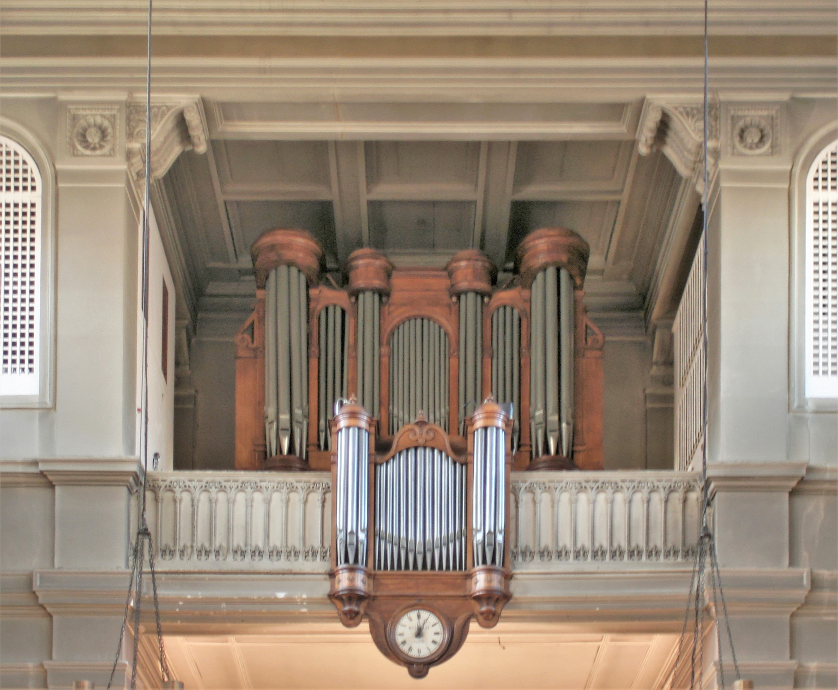 Église Saint-Jacques Saint-Christophe de la Villette, orgue.